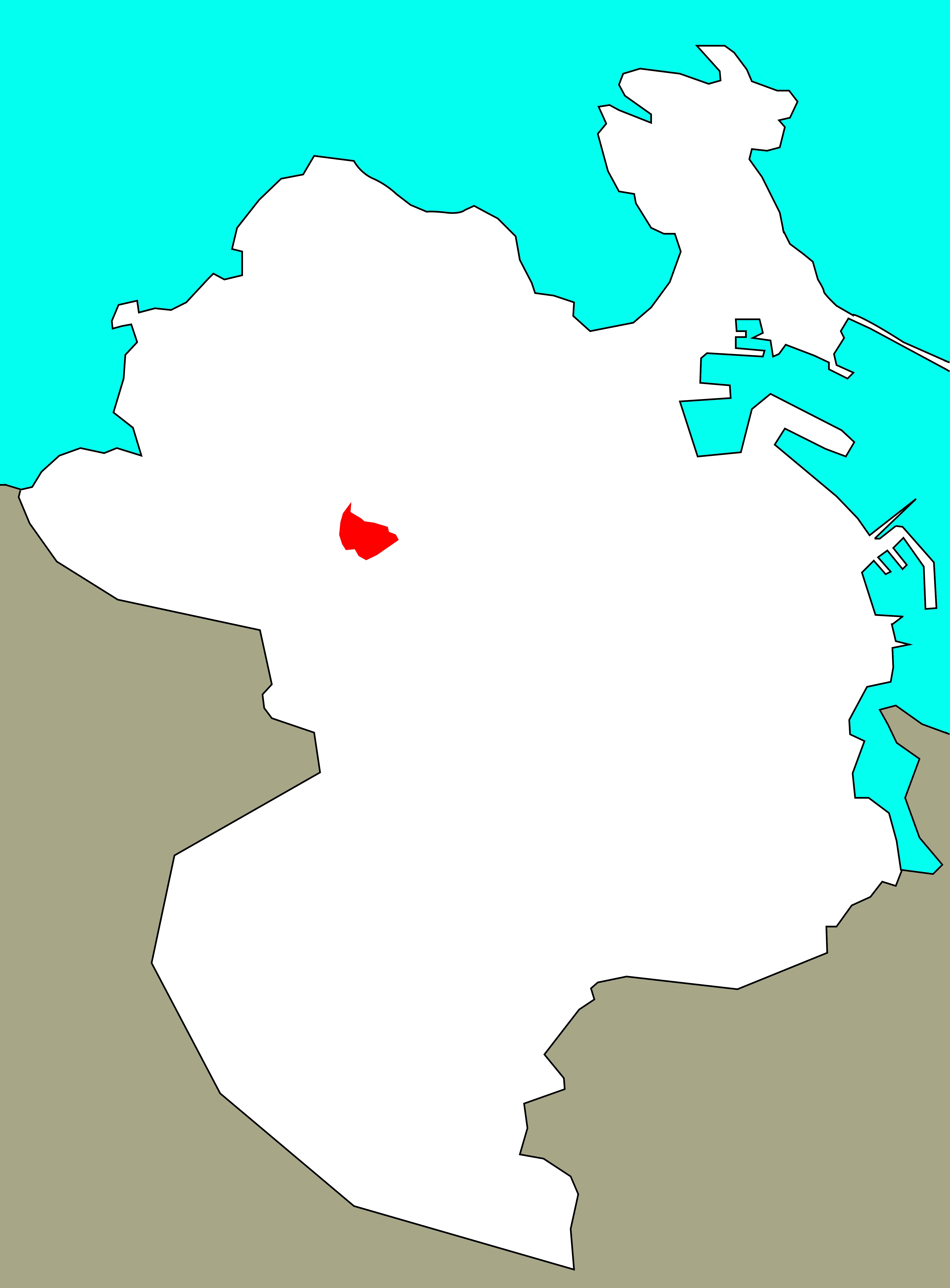 Situación da Moura no concello da Coruña.[1]